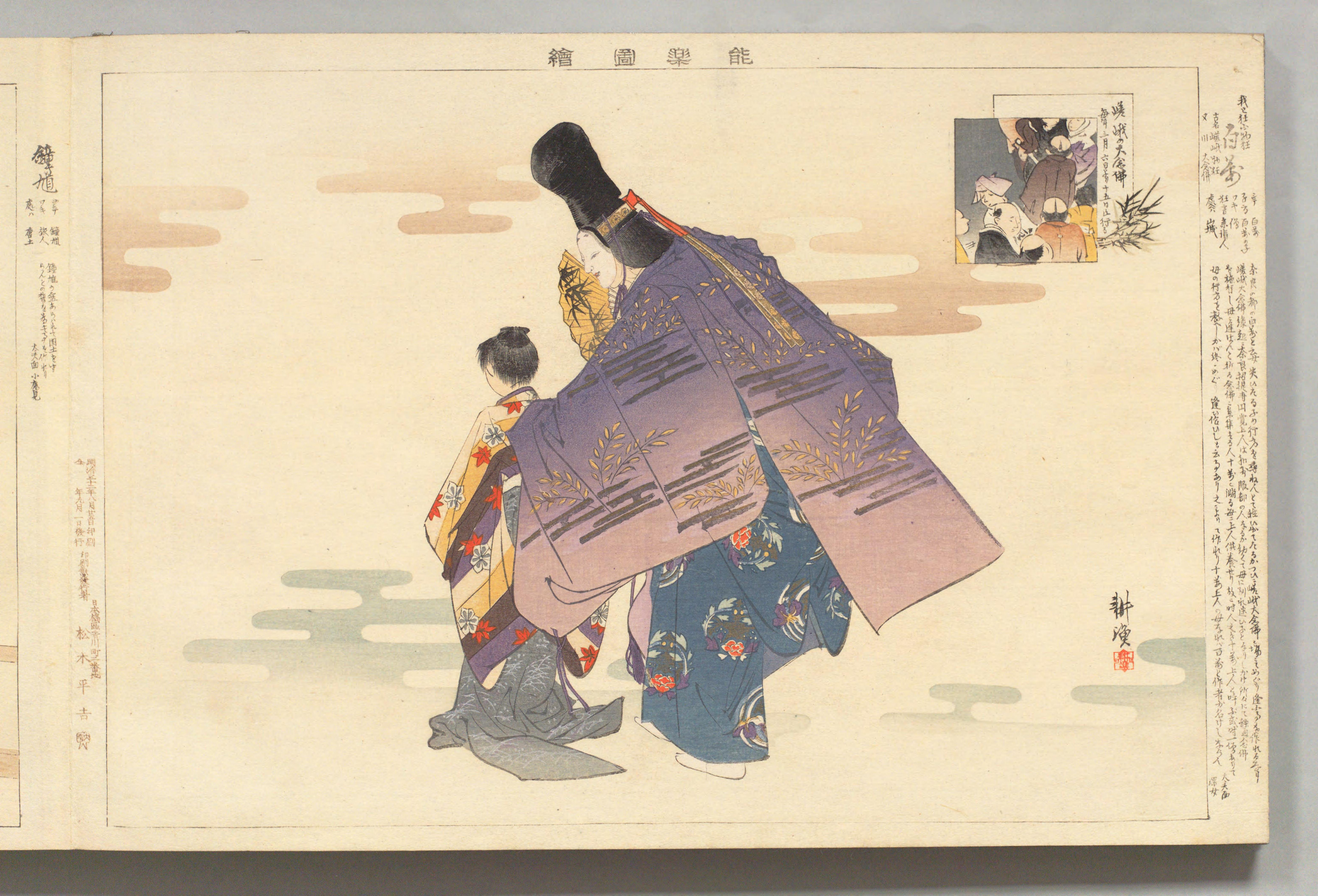 月岡耕漁の描いた能の演目「百万」 『能樂圖繪 後編 上』（1899年）より